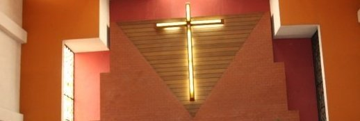 GBKP Jakarta Pusat